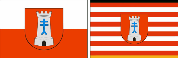 Flaggen-Varianten von Bietigheim-Bissingen (links die offizielle Form)